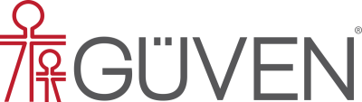 Güven Hastanesi'nin Resmî Logosu